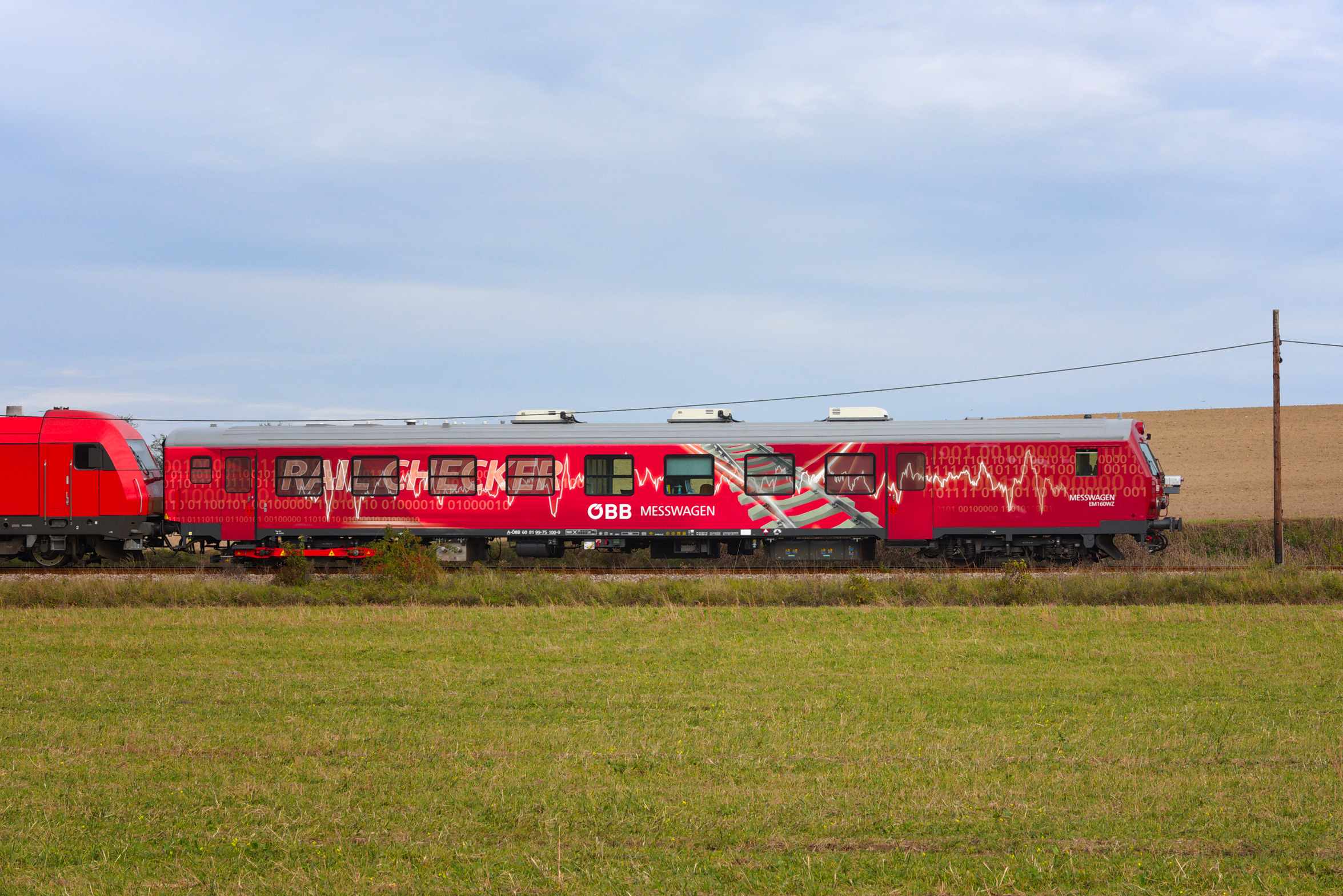 Messwagen "Railchecker" 99-75 100